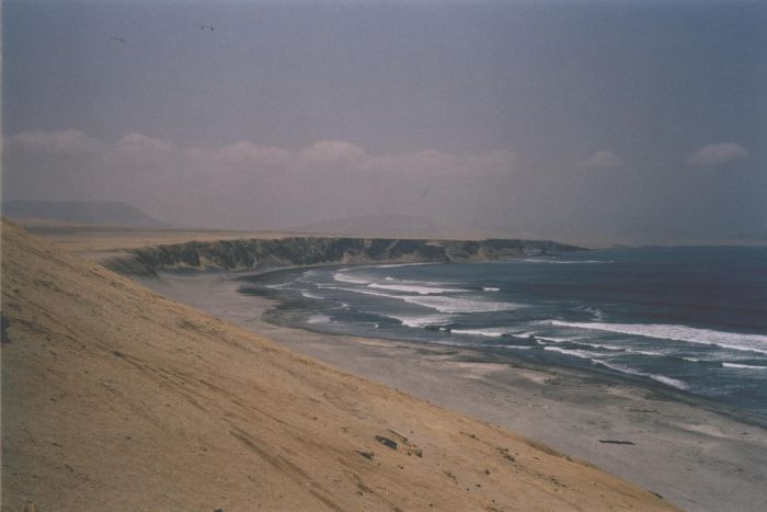 Area of Peninsula de Paracas